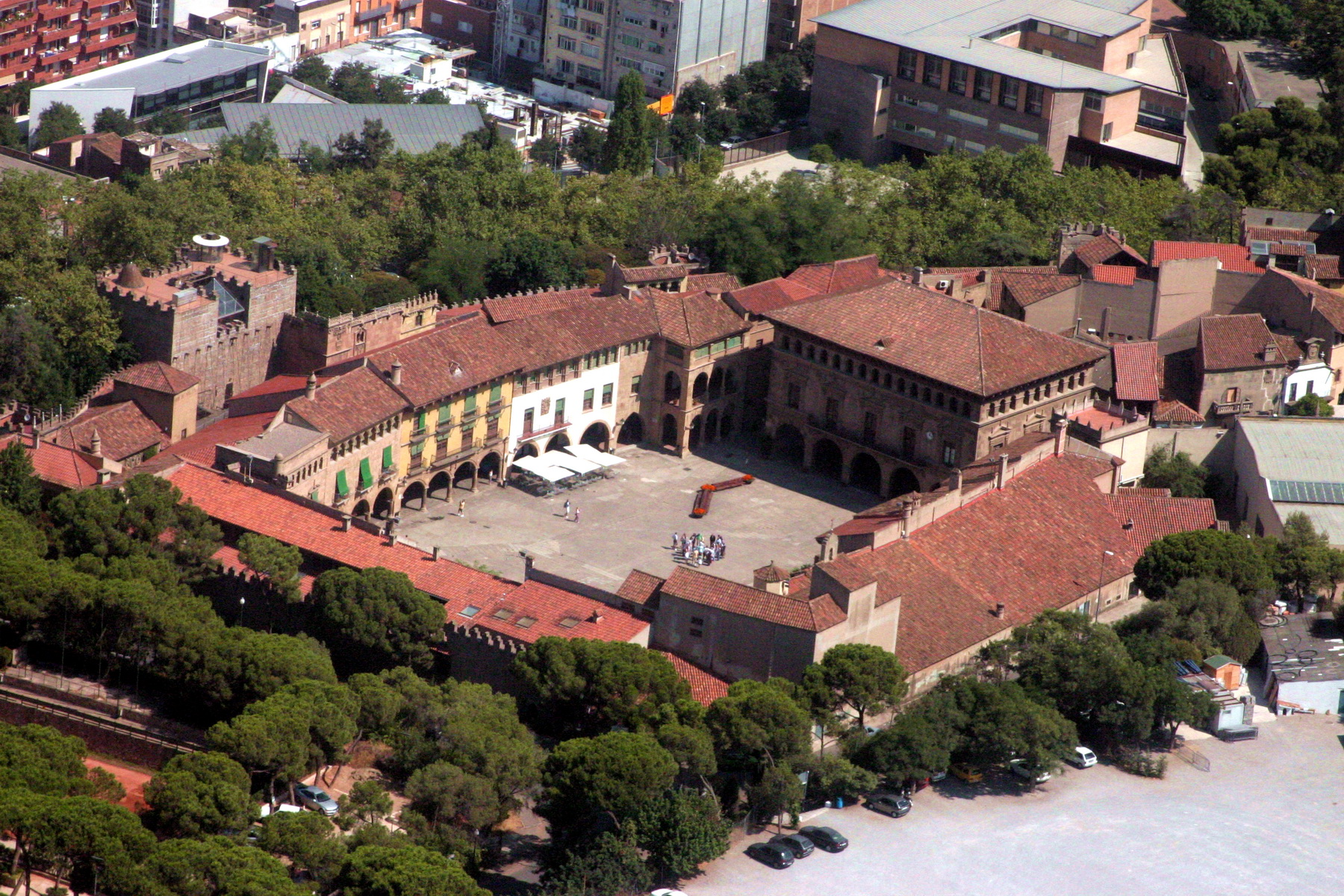 Vista aèria del Poble Espanyol, Barcelona-Catalunya